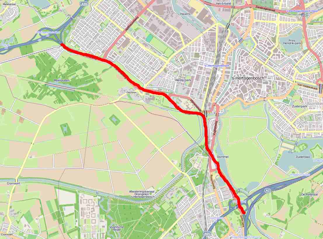 Randweg Den Bosch west